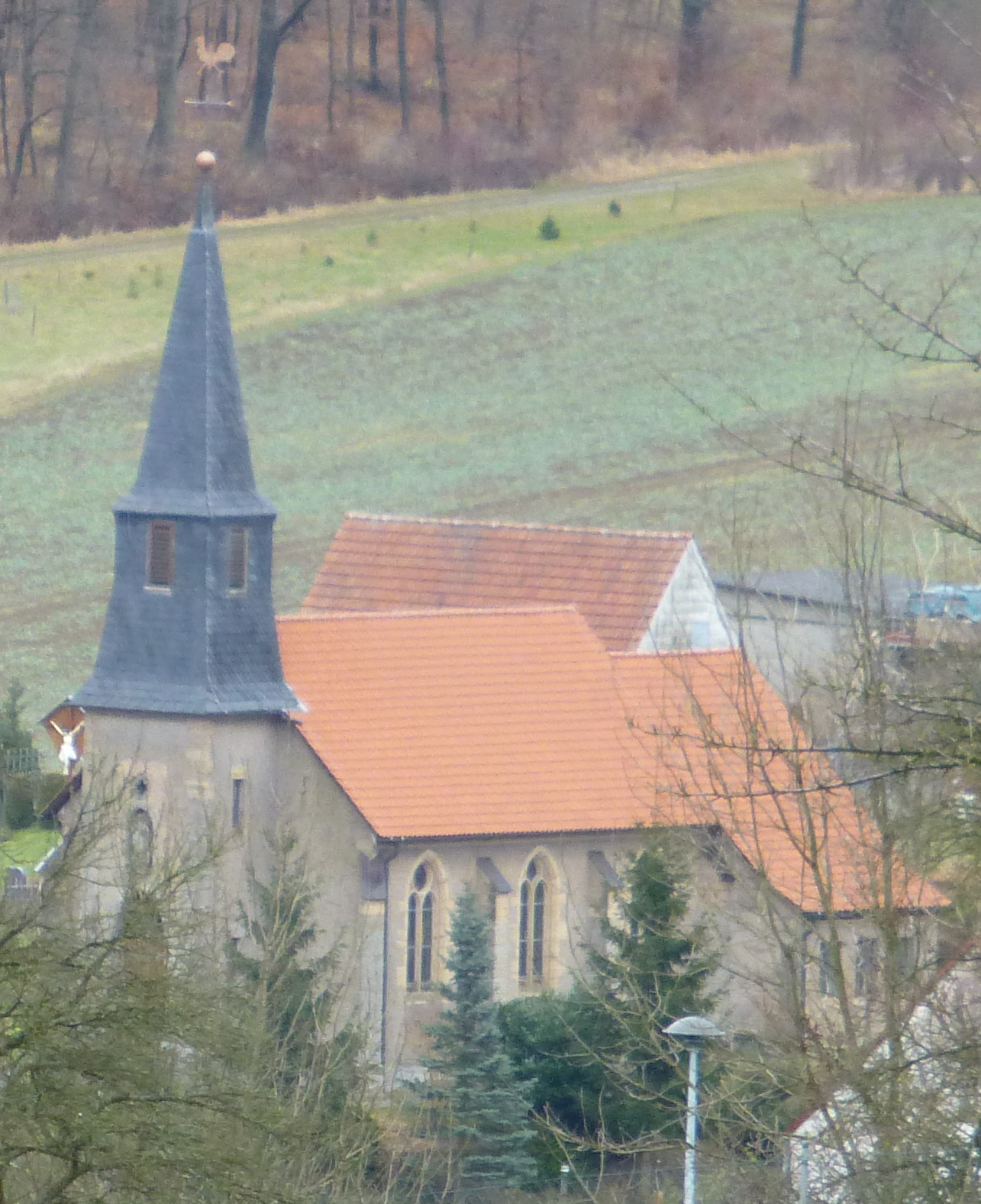 Kirche in Schierschwende unter dem Knothstein